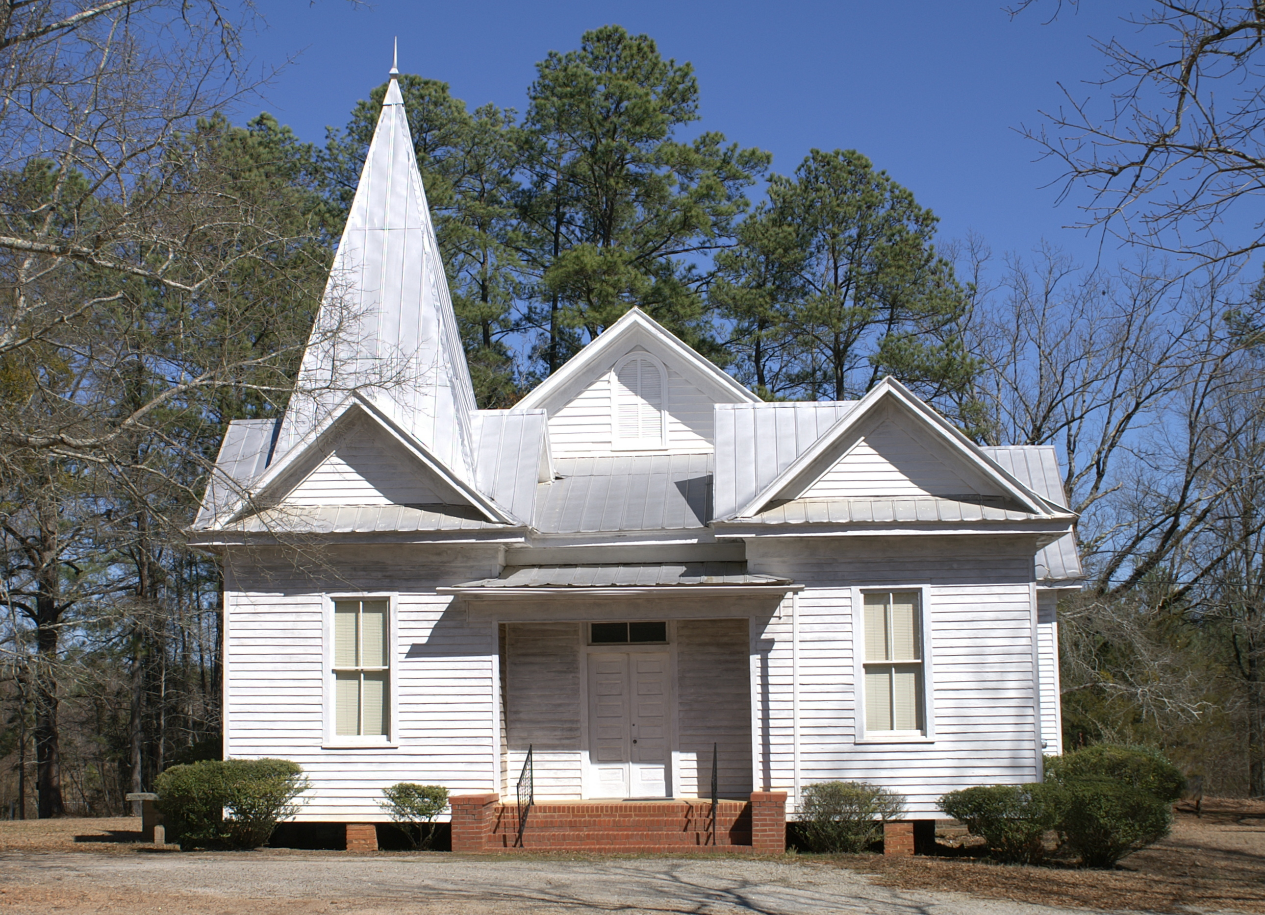 Powelton Baptist Church